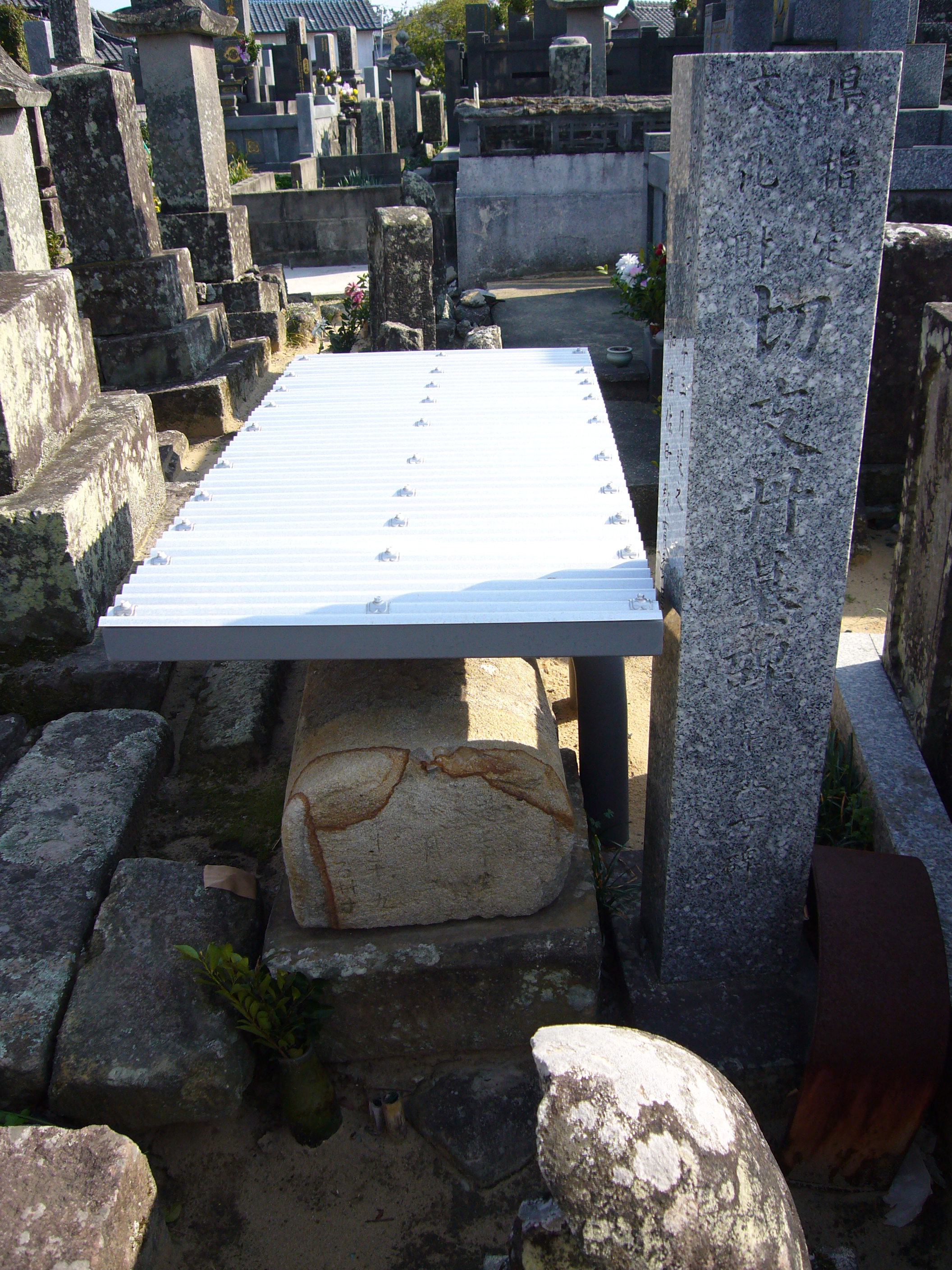 Photograph of Christian tombstones in Suzaki,Kazusa,Nagasaki,Japan.